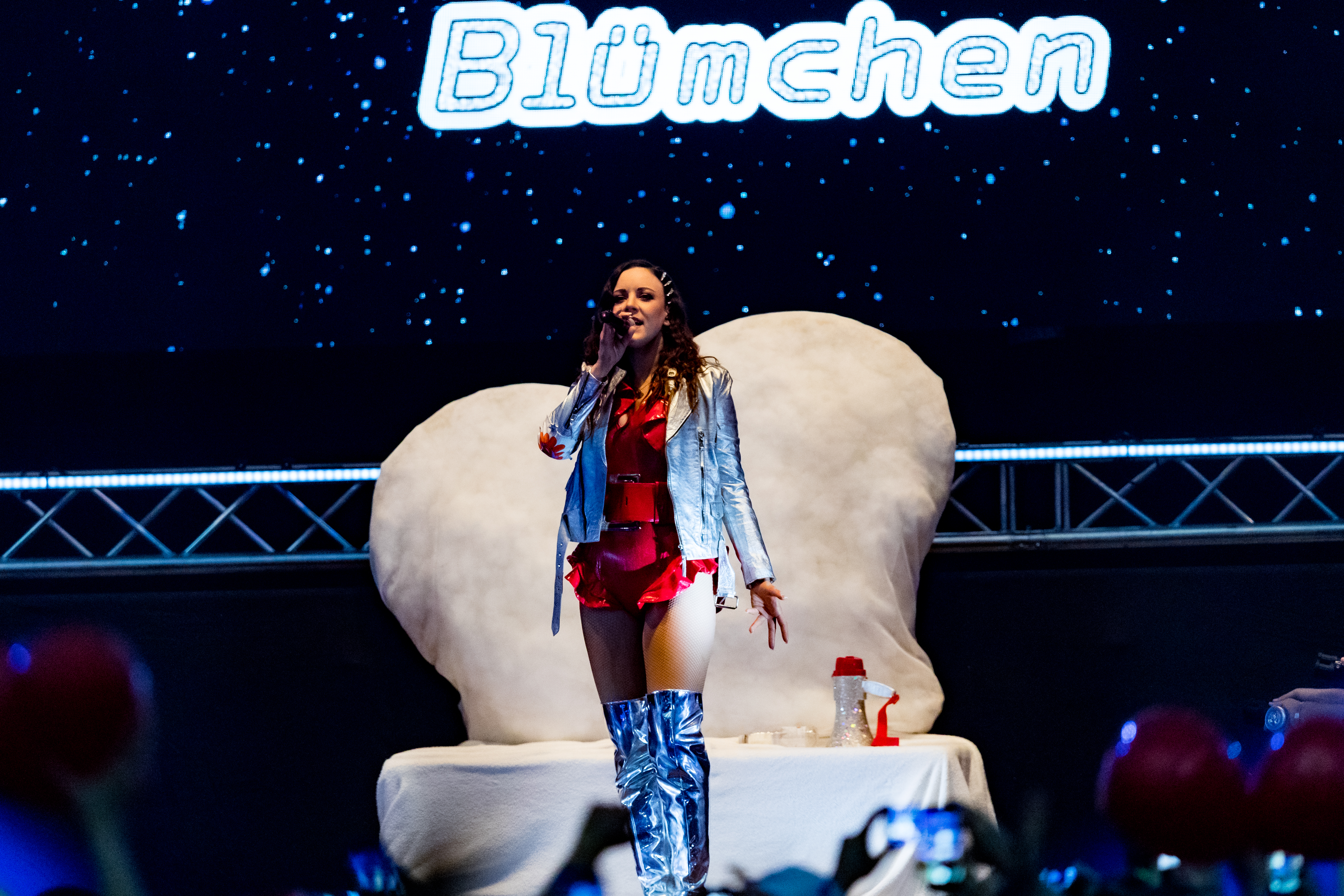 Blümchen during Sunshine Live - Die 90er Live on Stage at Maimarkthalle & Maimarktclub, Mannheim, Baden-Württemberg, Germany on 2019-12-01, Photo: Sven Mandel